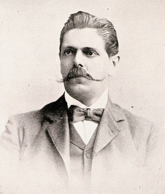 Ascanio Bascuñán Santa María como Ministro de Guerra y Marina en 1904. Ascanio Bascuñán Santa María(Concepción, 26 de marzo de 1860 - 24 de abril de 1935.)